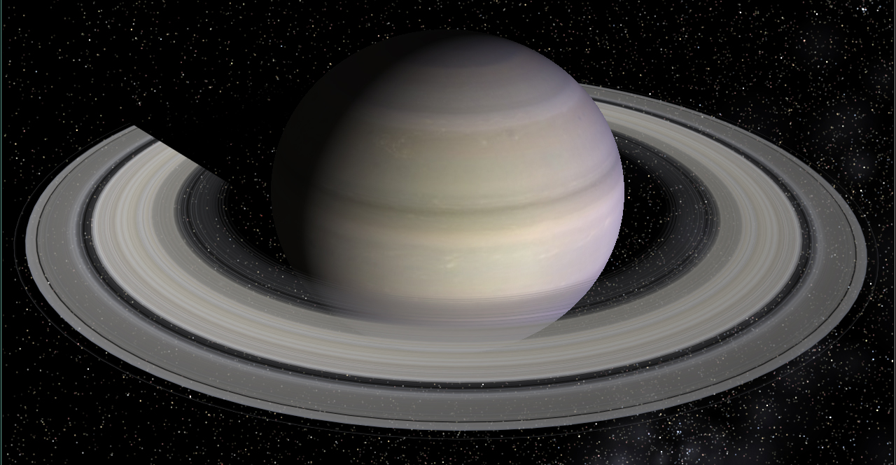 Saturn